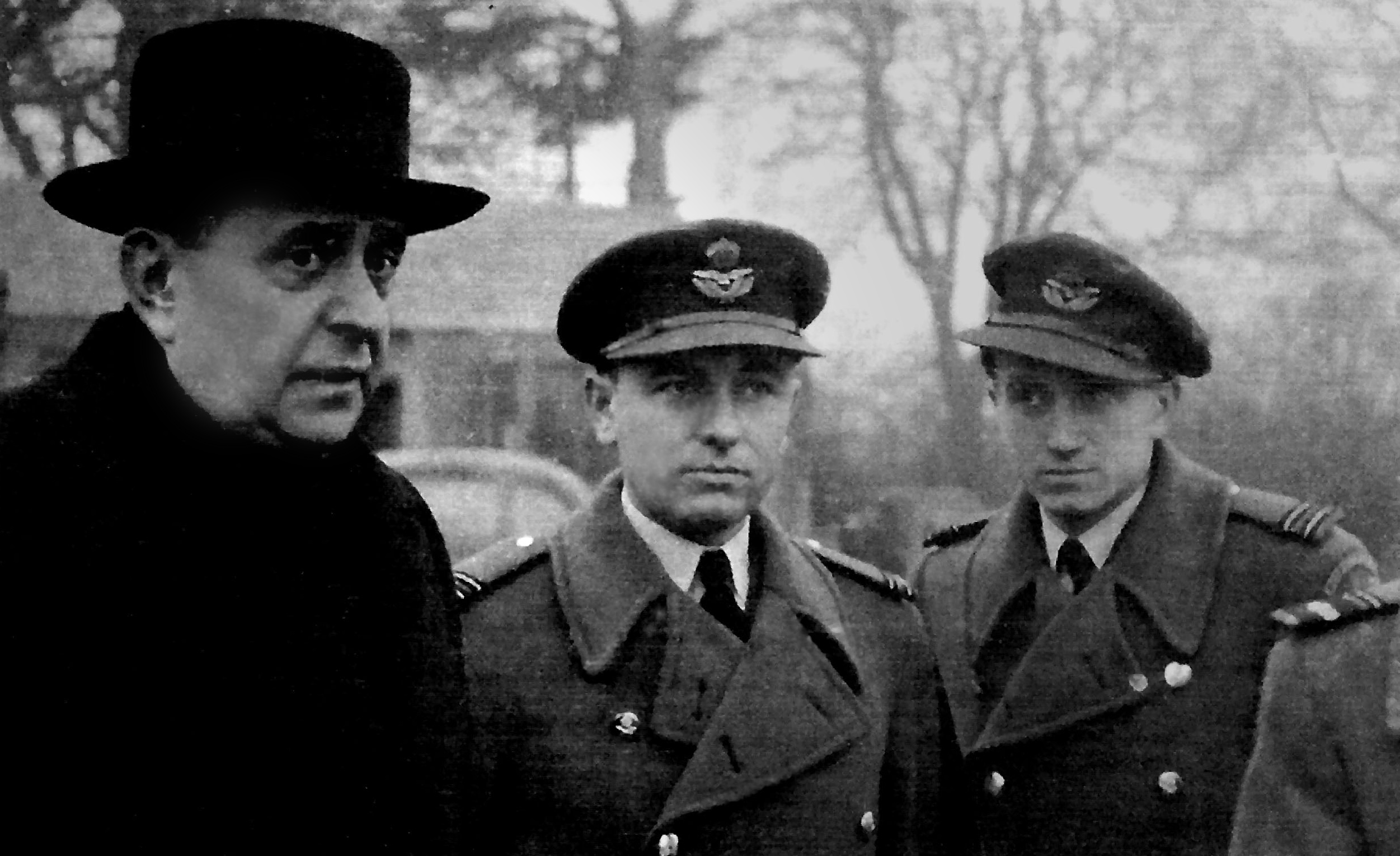 Návštěva ministra zahraničí Jana Masaryka u 313.čs.perutě. Uprostřed Stanislav Rejthar, vpravo Bohuslav Kimlička